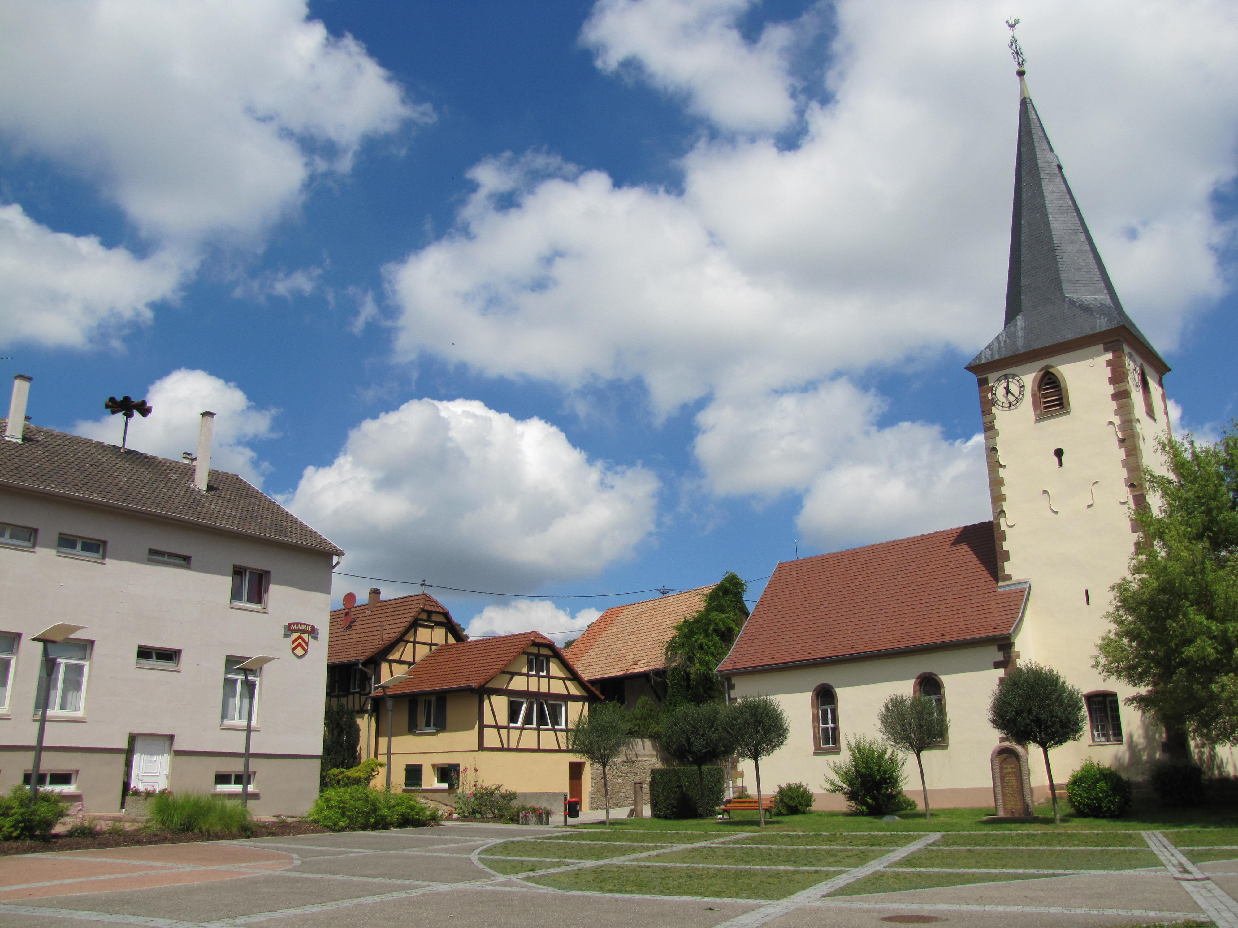 Alsace, Bas-Rhin, Berstett, Gimbrett, Place de la Mairie, Église protestante (IA67005697).